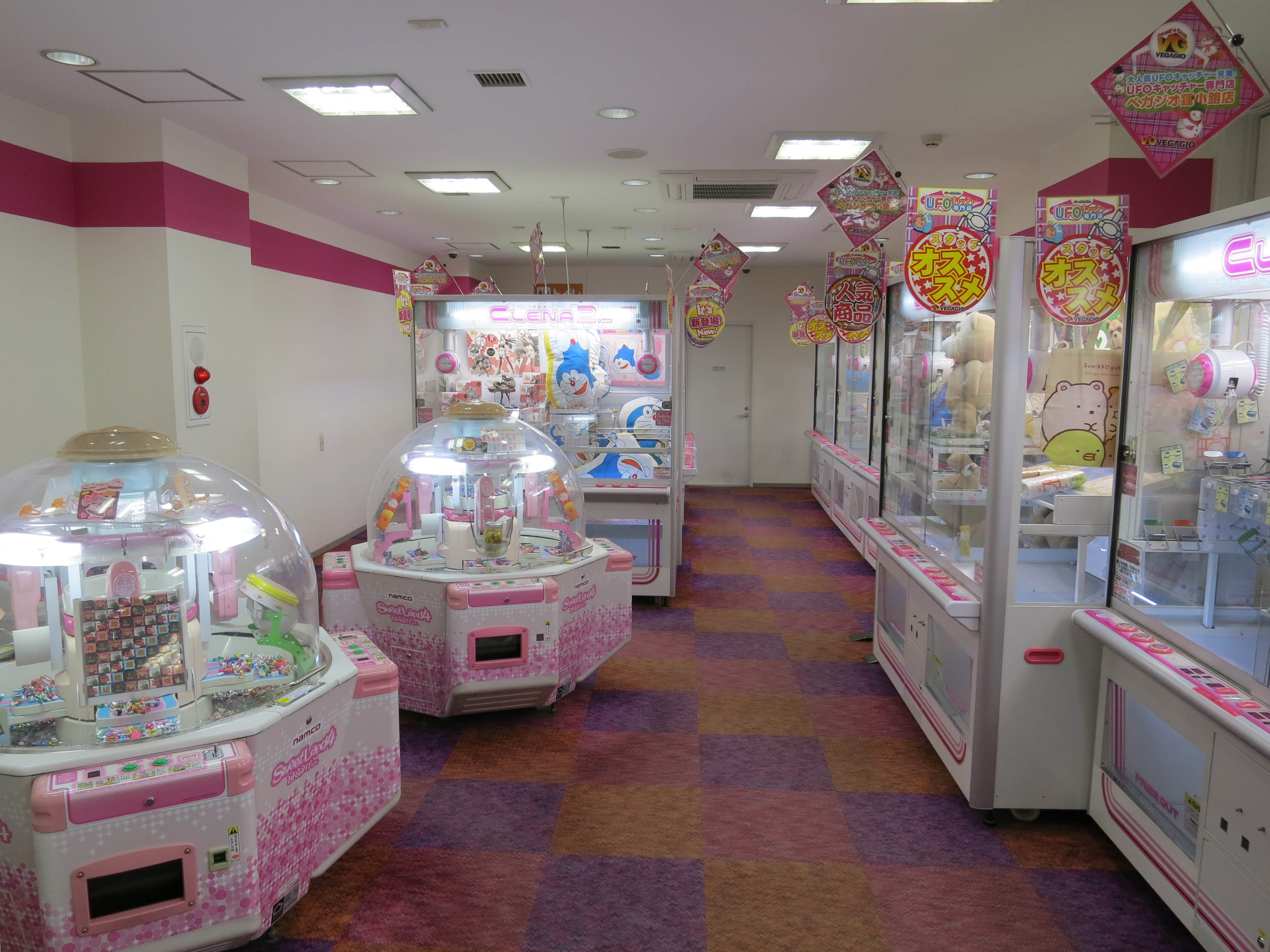 オススメ